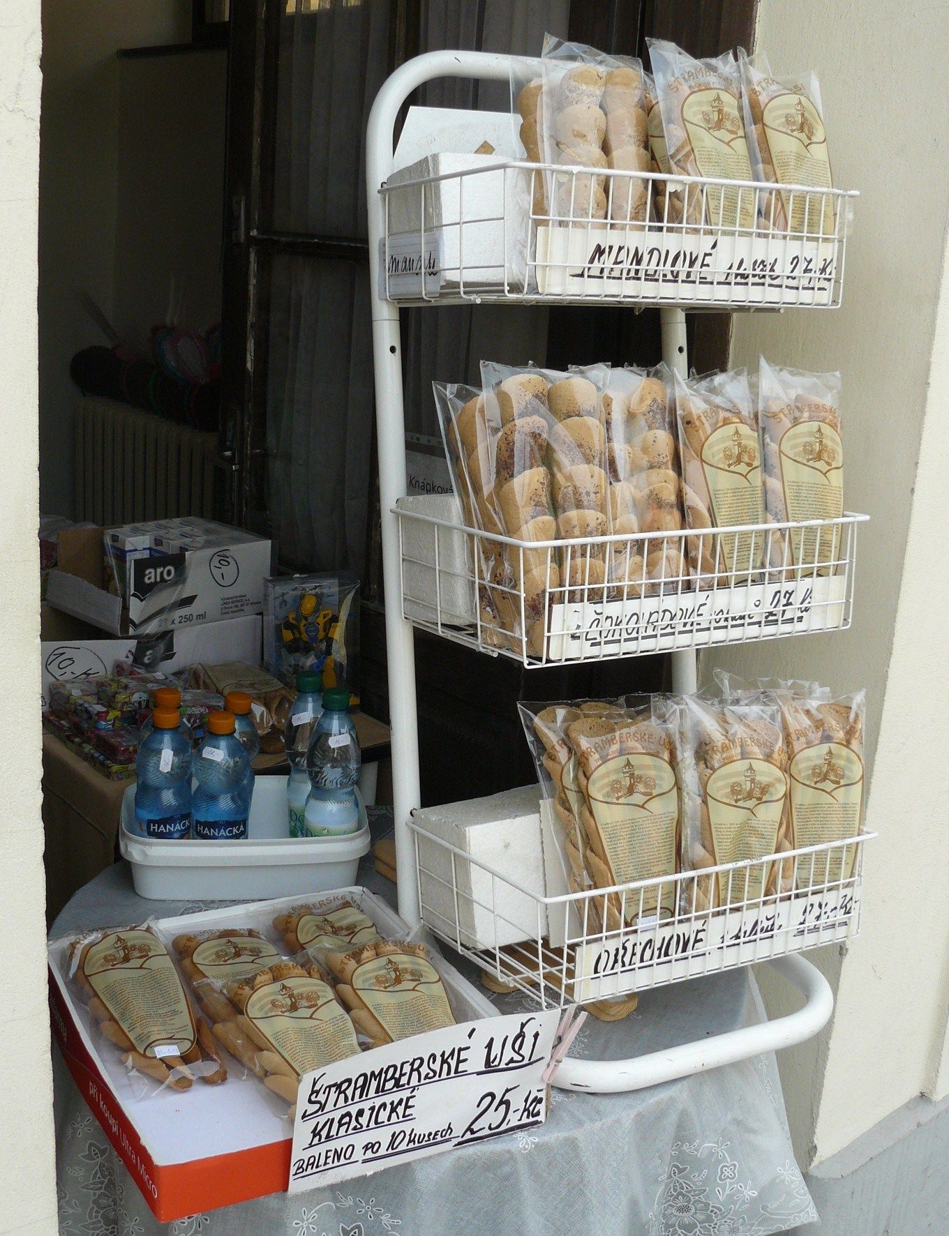 Handel uszami sztramberskimi w Sztramberku na rynku.